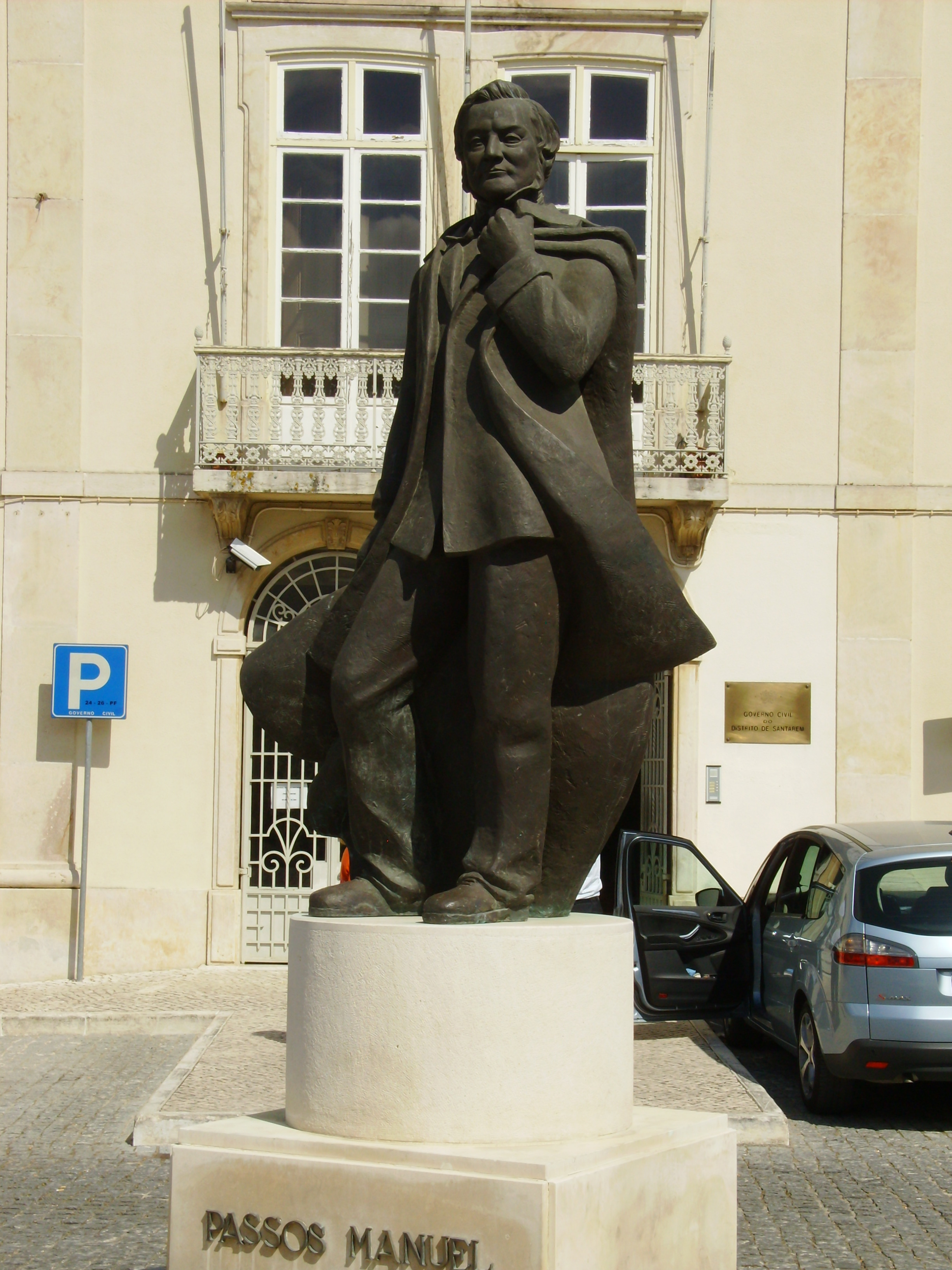 Estátua em homenagem a Passos Manuel (1801-1862), Santarém, Portugal.